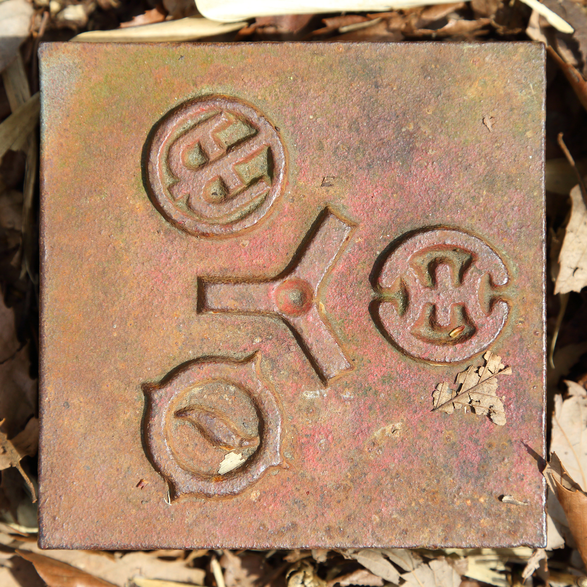 タイトルの通りです。